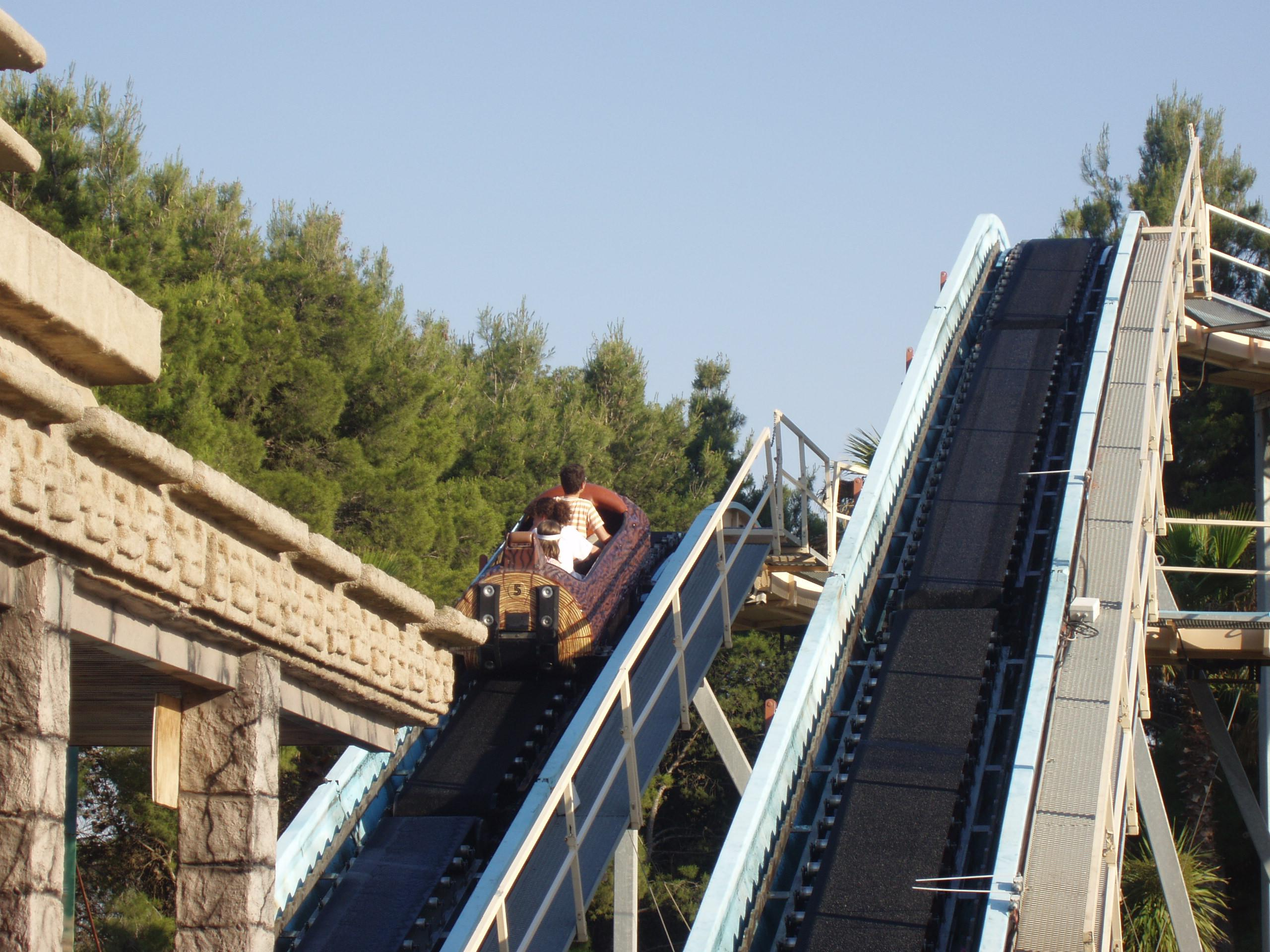 Gran tikal atraccion del parque de atracciones de Zaragoza